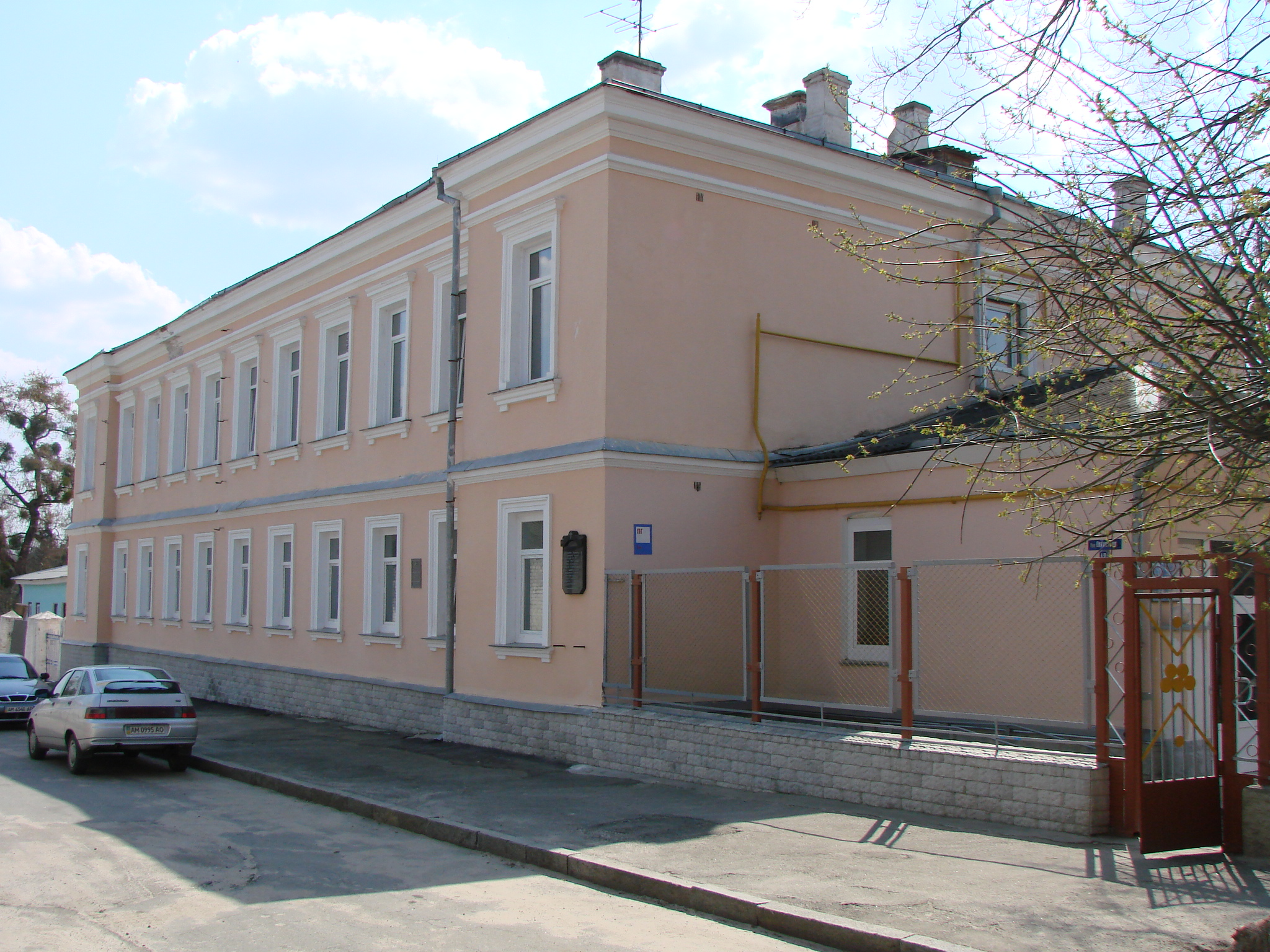 Маріїнський дитячий притулок, Житомир, вул. Дитячої комуни, 12